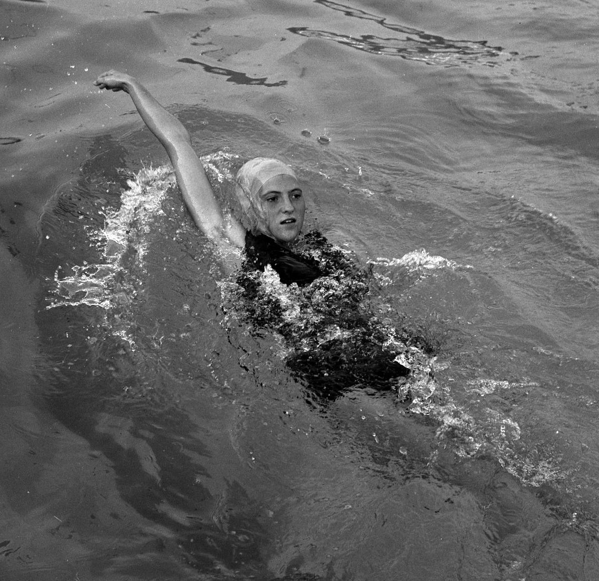 Piscine Castex (Parc Municipal des Sports, île du Ramier). 31 juillet 1964. Plan moyen de Françoise Borie (nageuse des Dauphins du Toulouse Olympique Employés Club TOEC) nageant le dos crawlé, un bras est hors de l'eau ; vue en plongée. Observation: Françoise Borie a participé aux Jeux Olympiques de Tokyo en 1964 avec Christine Caron.